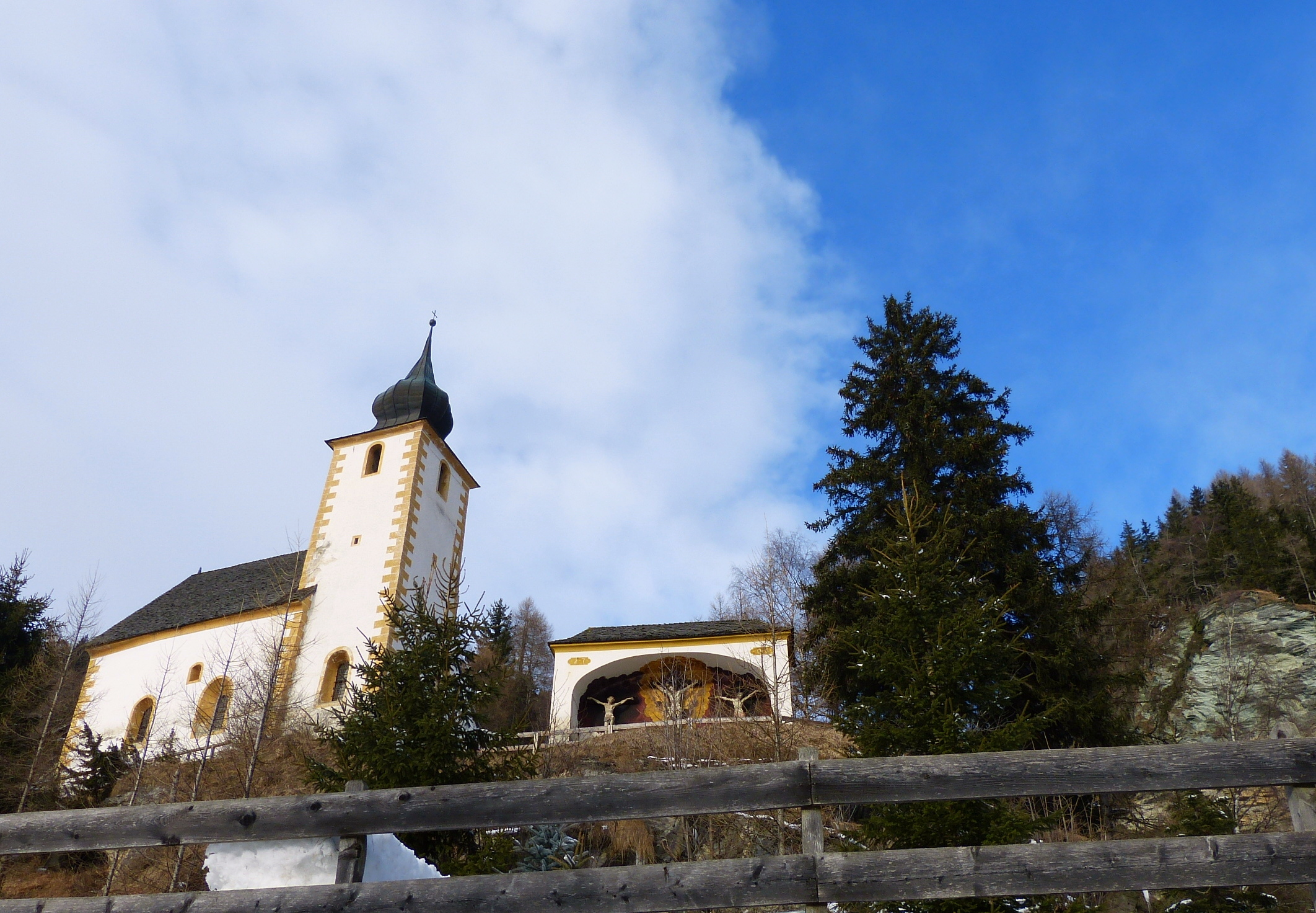 Kapelle St.Egidi mit Kreuzigungsgruppe in Höf, St.Michael im Lungau, Salzburg-Land